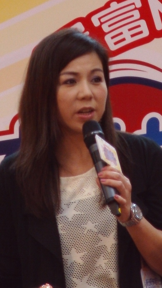 中文（香港）: 劉美娟的樣子